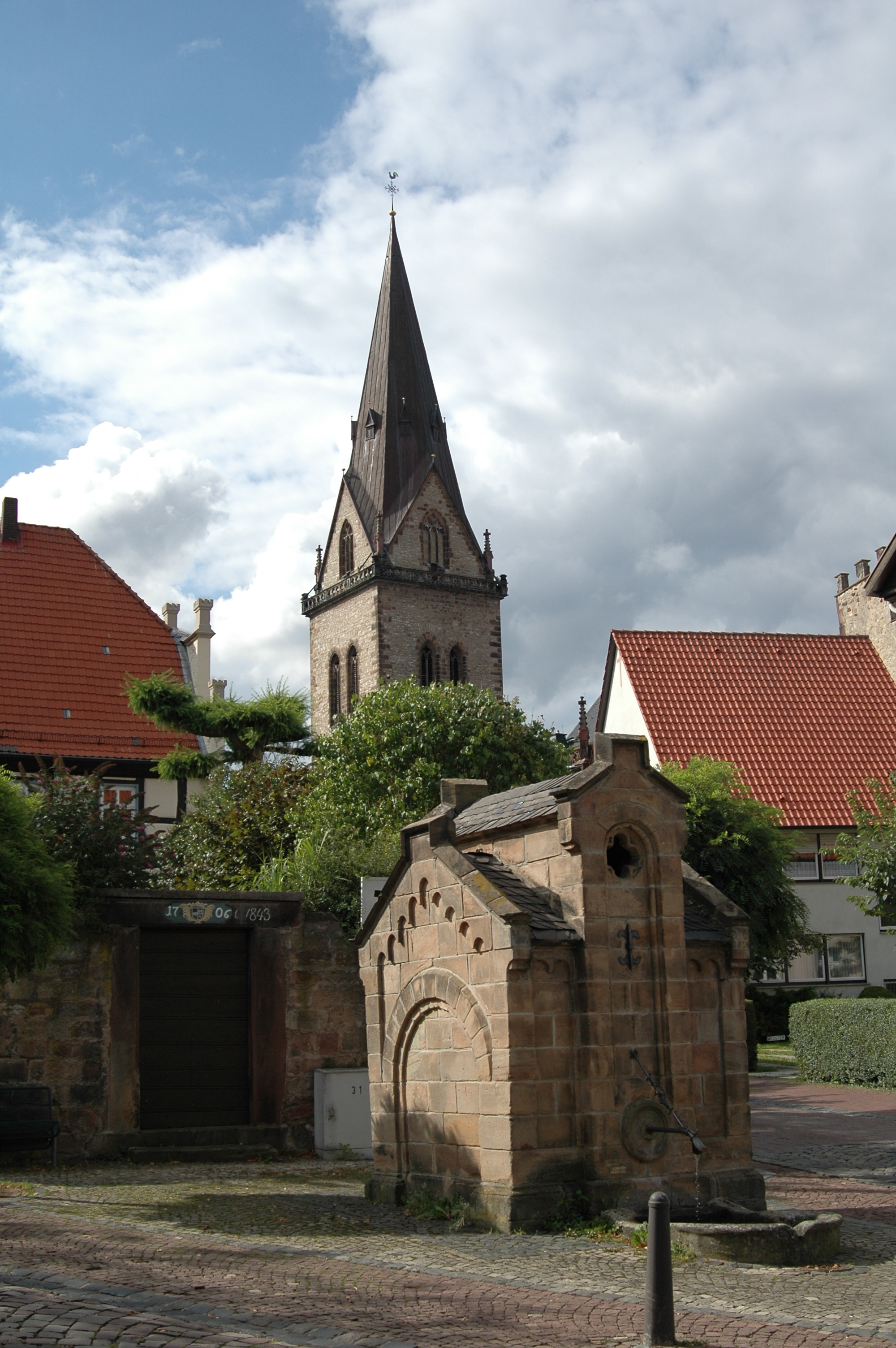 Warburg, Blick auf die Kirche